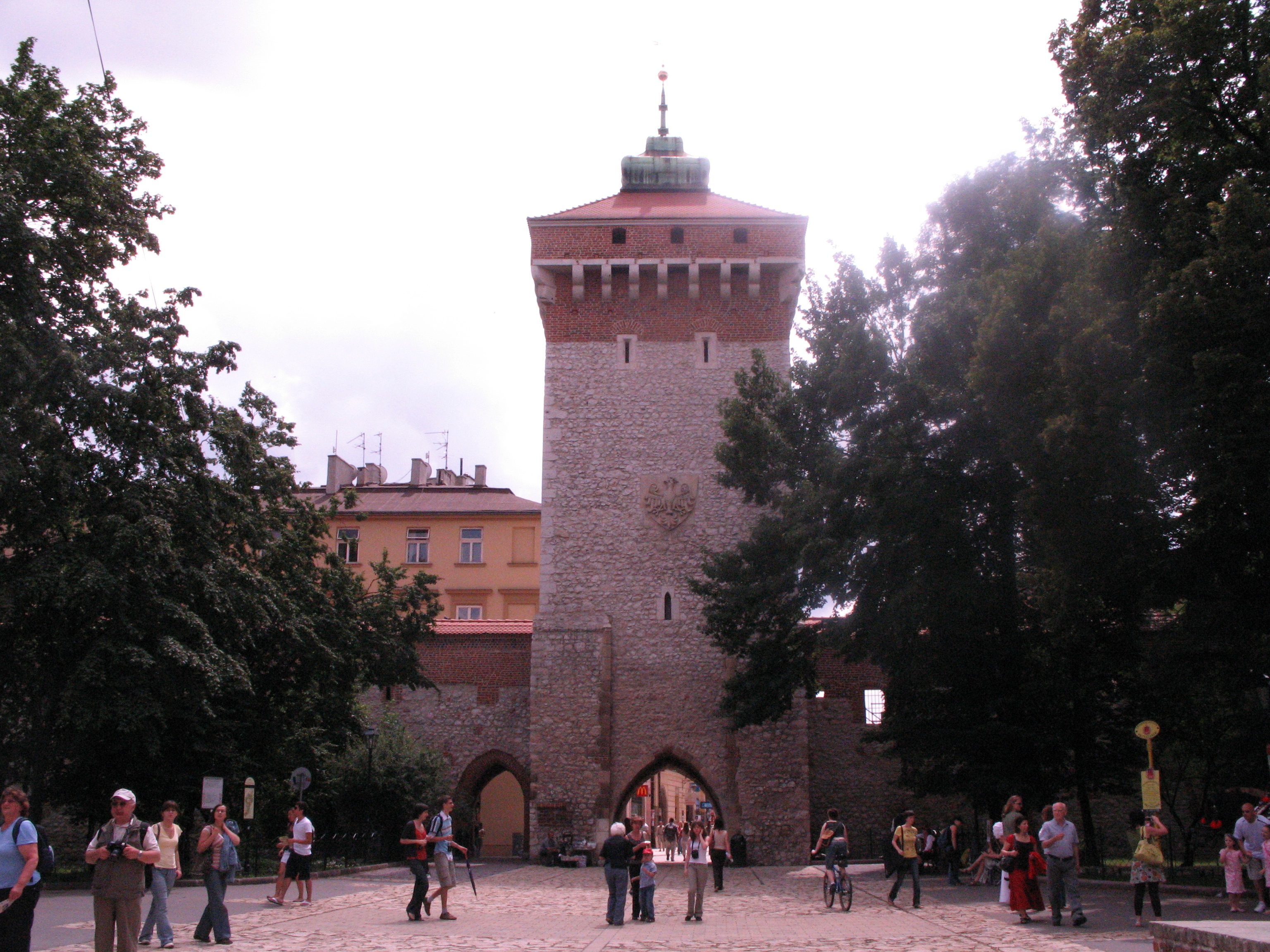 Florian Gate in Kraków, Poland